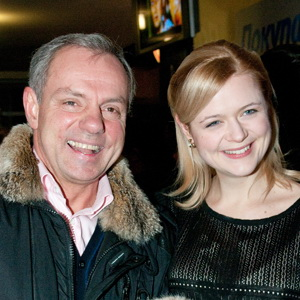 Александр Мохов с супругой, актрисой Дарьей Калмыковой на премьерном показе фильма "Любовь-морковь 3"